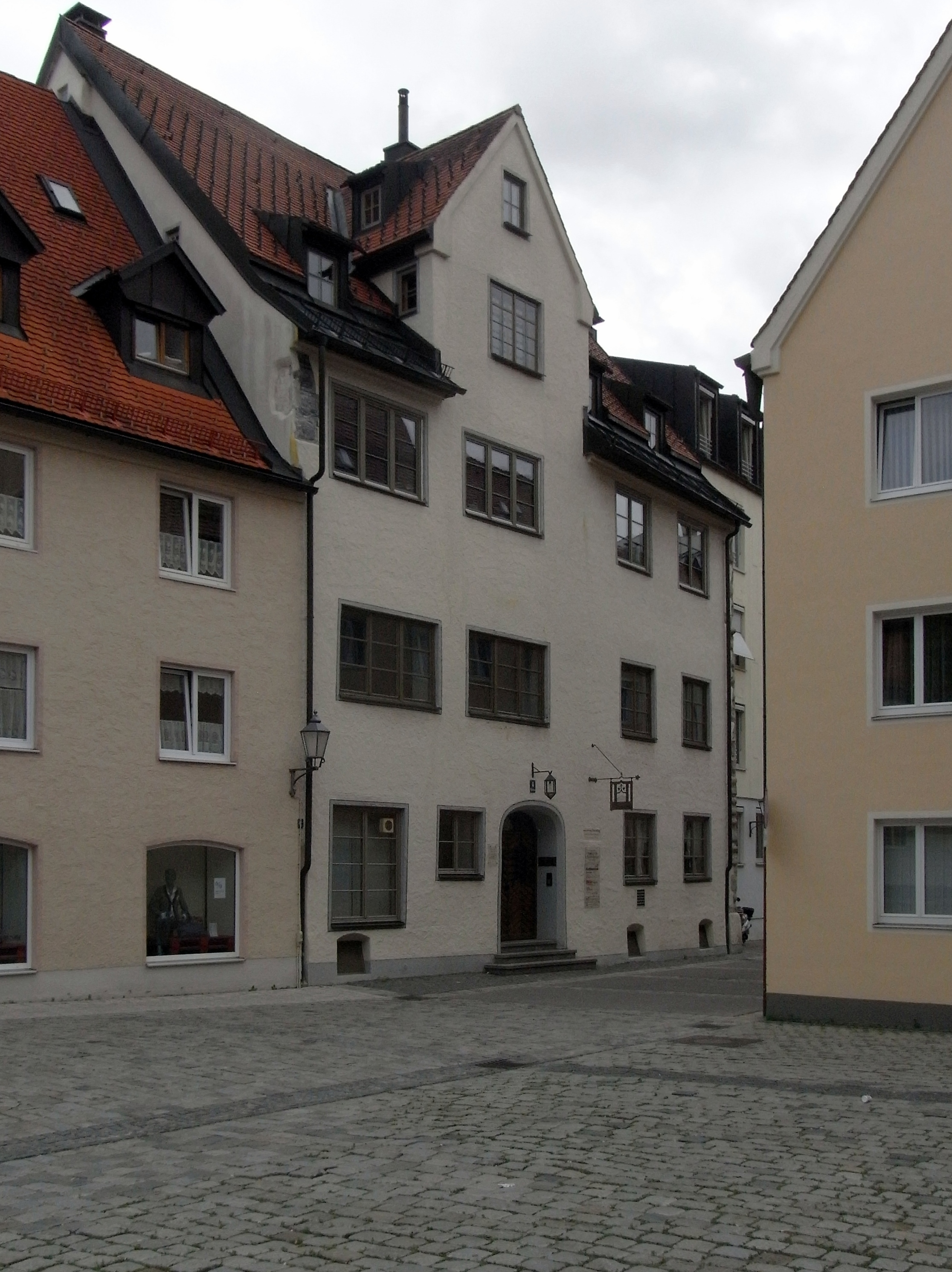 Vogthaus in Kempten, gesehen von der Vogtstraße / Müßiggängelhaus aus